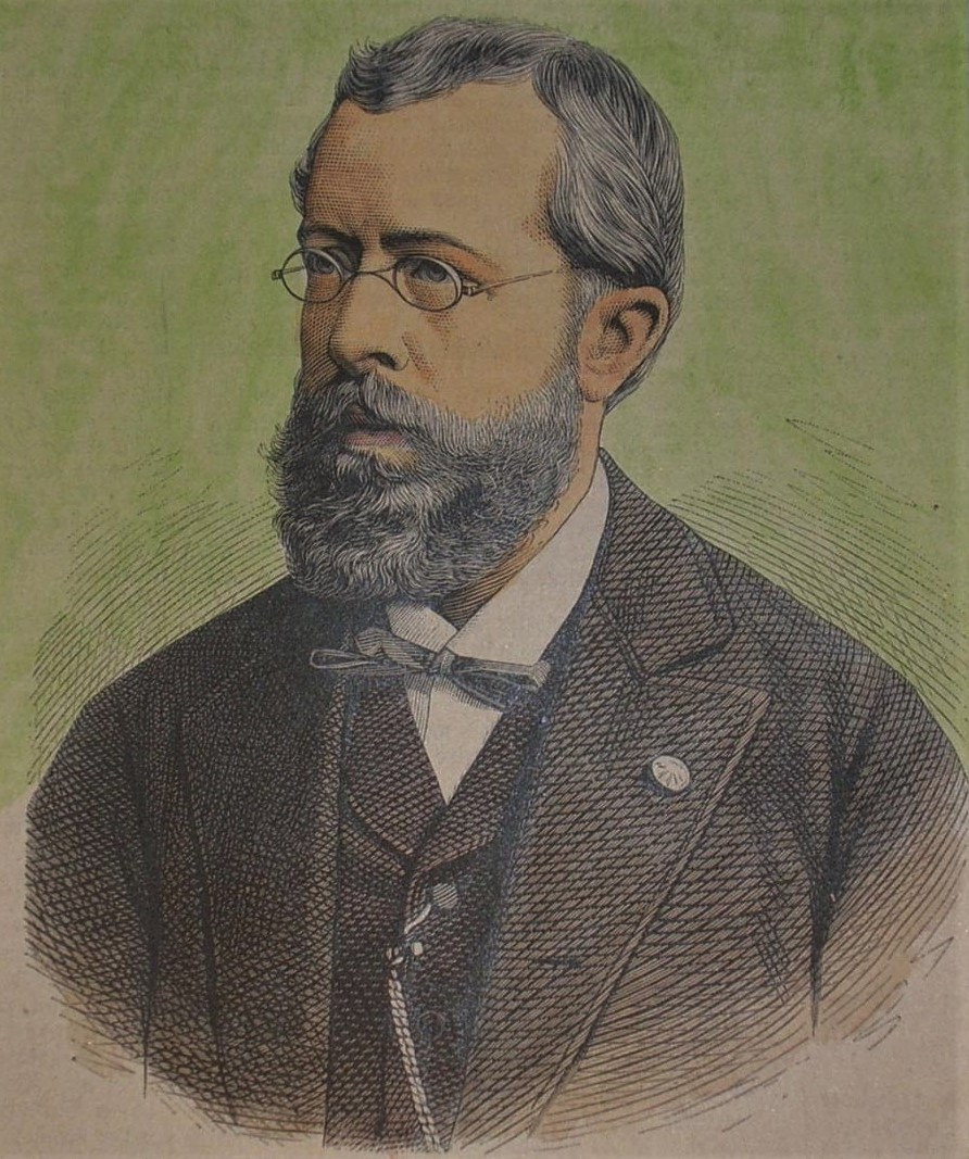 Johannes Fastenrath, 1877, teilkolorierter Holzstich, ca. 15 x 12 cm